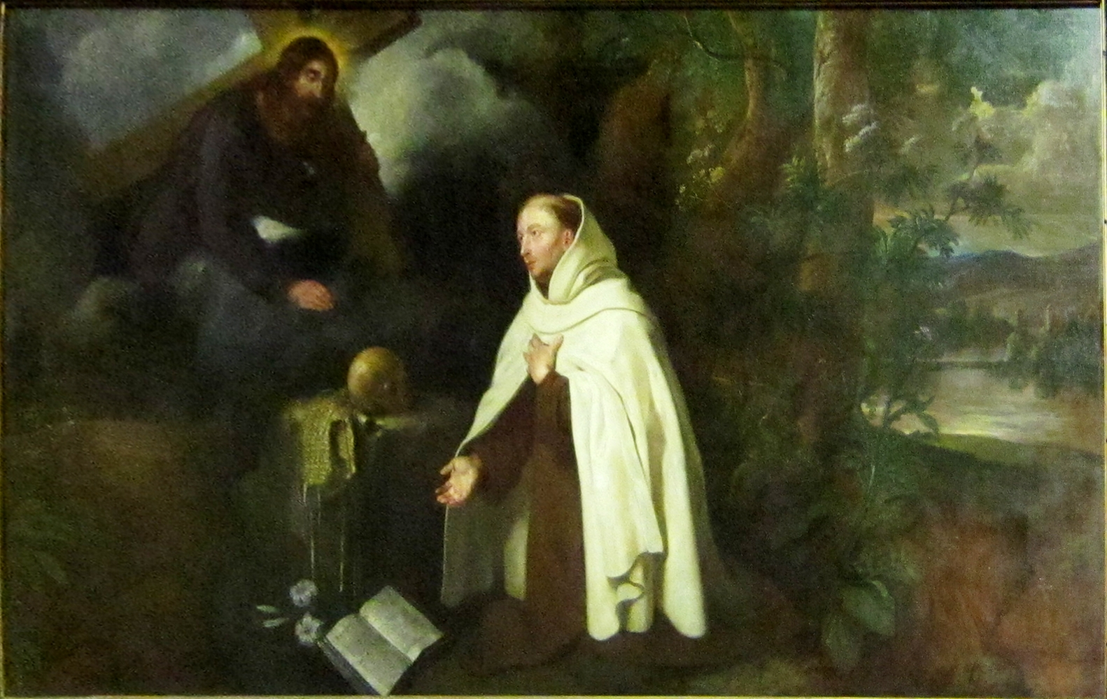 La Vision de saint Jean de la Croixtitle QS:P1476,fr:"La Vision de saint Jean de la Croix" label QS:Lfr,"La Vision de saint Jean de la Croix"